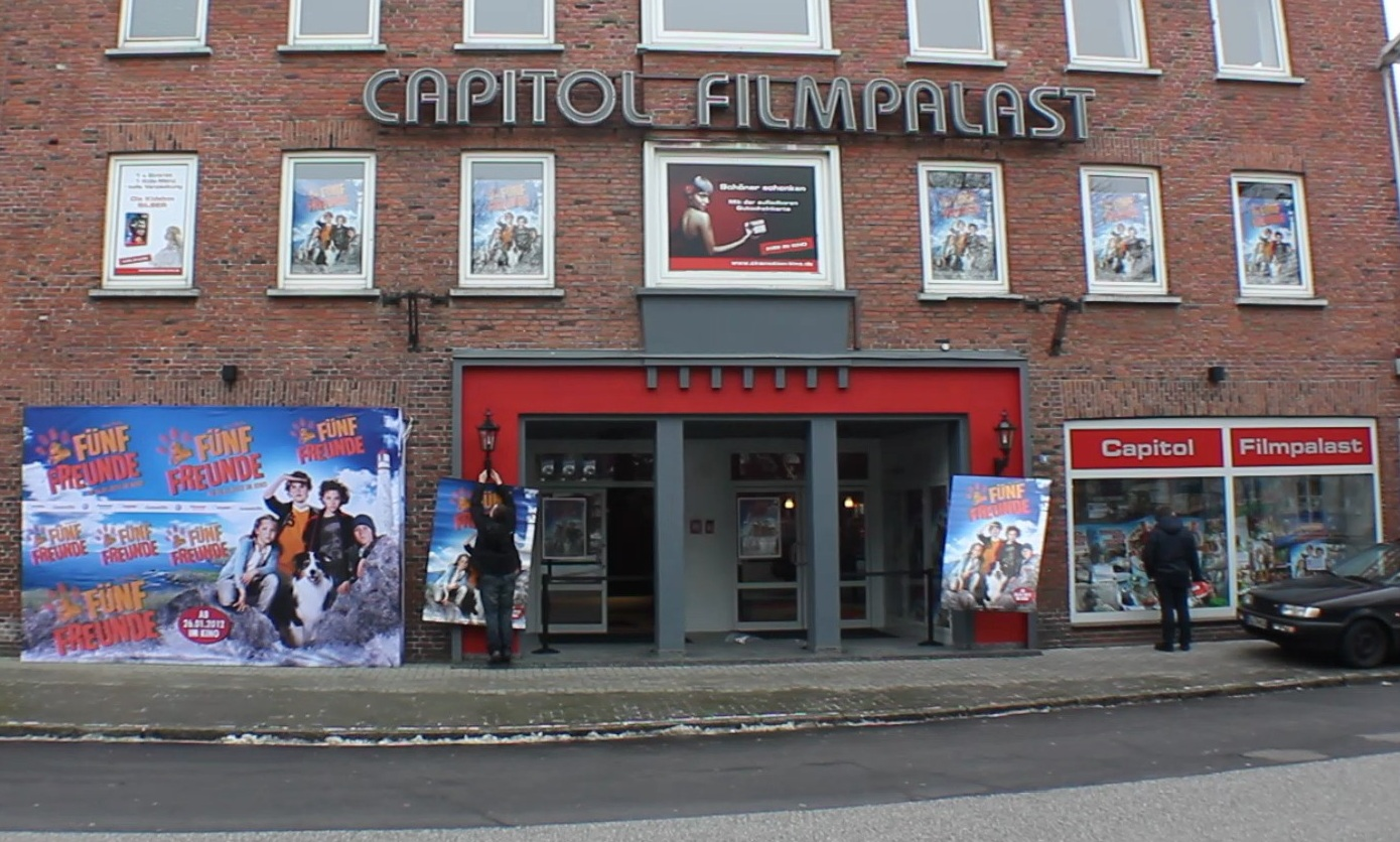 Capitol Filmpalast (Die Schleswigpremiere von Fünf Freunde 2012)